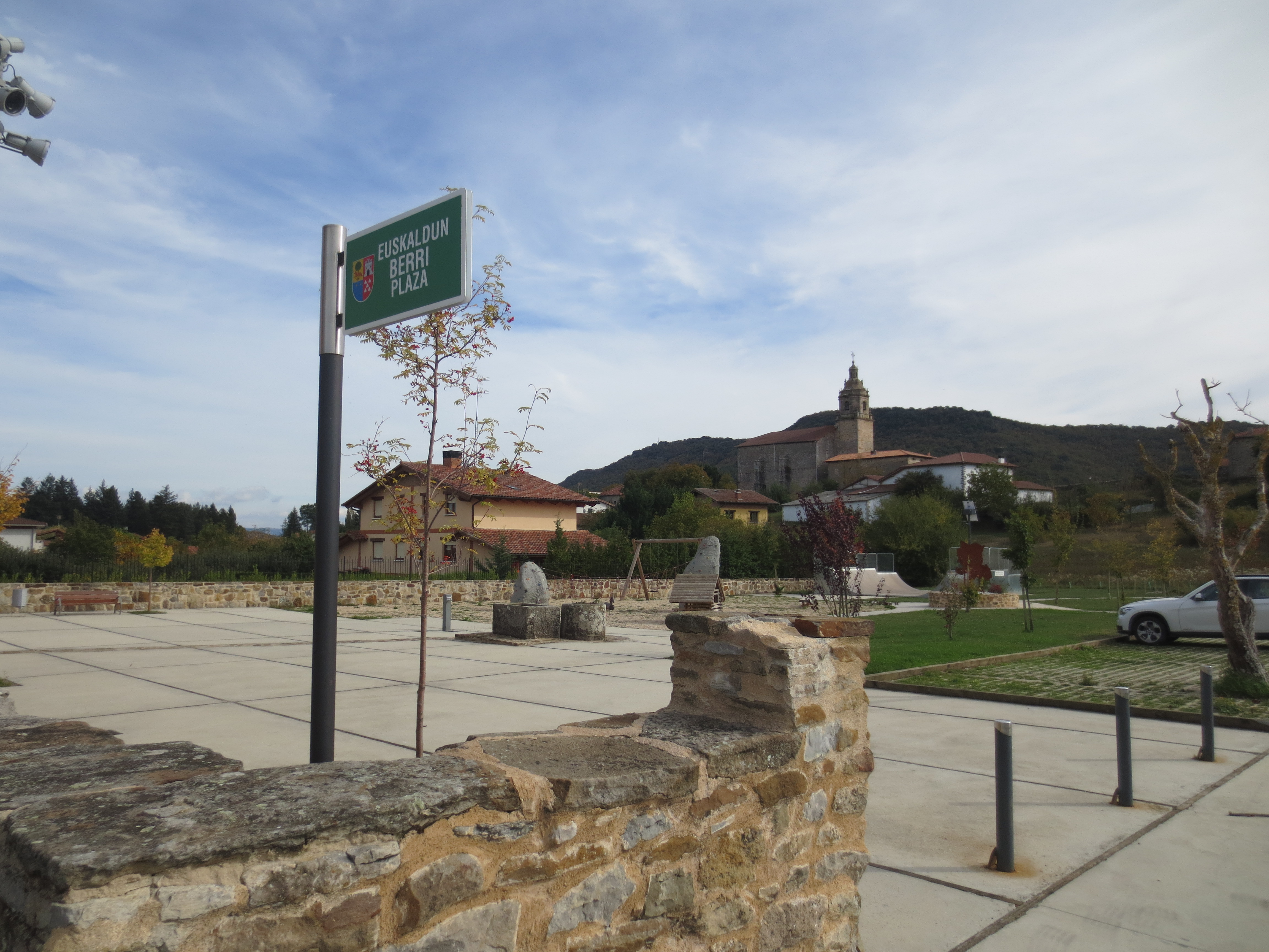 Euskaldun berri plaza Ozaeta Barrundian, Araban